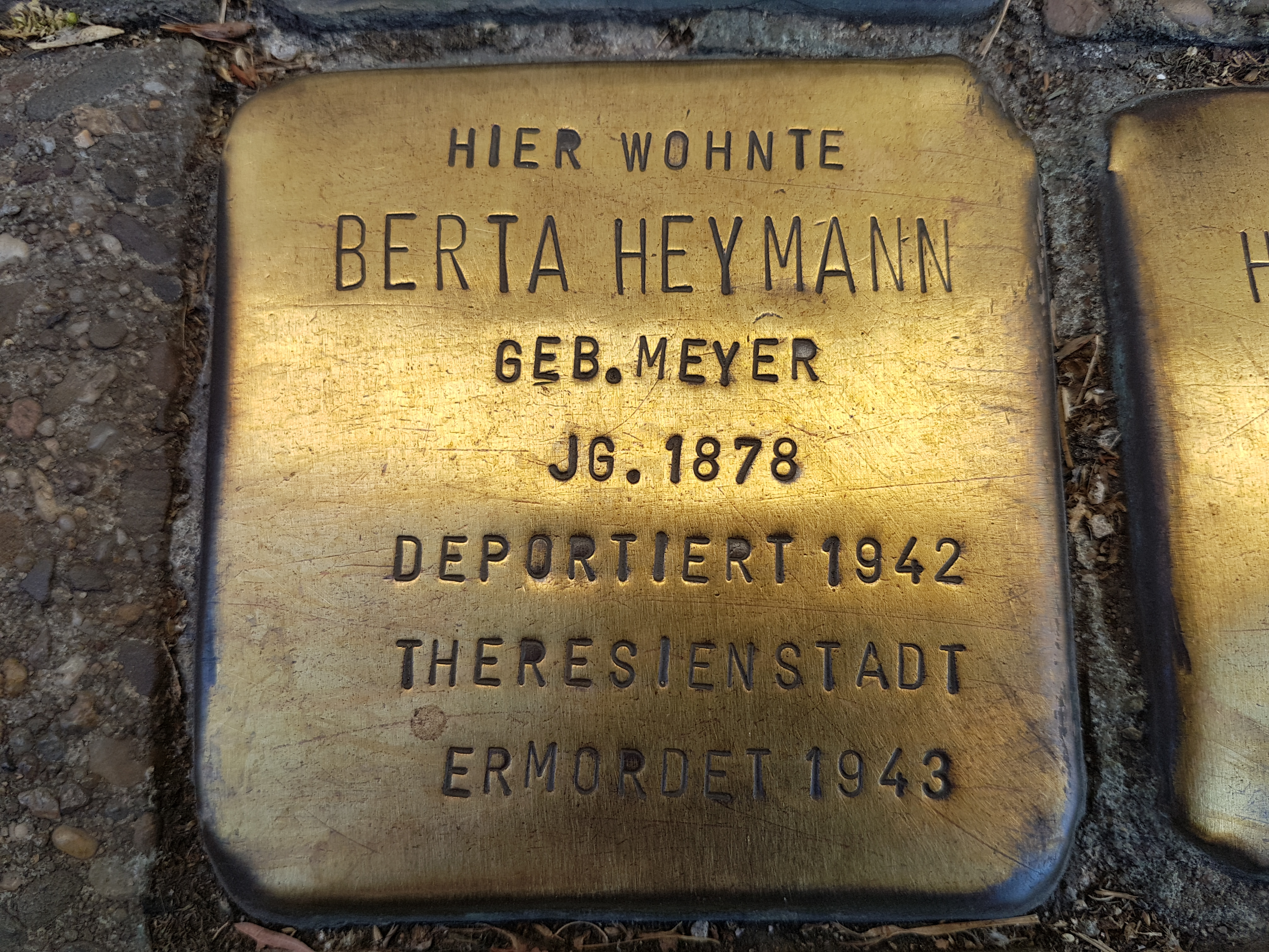 Stolperstein Duisburg Heinz Heymann